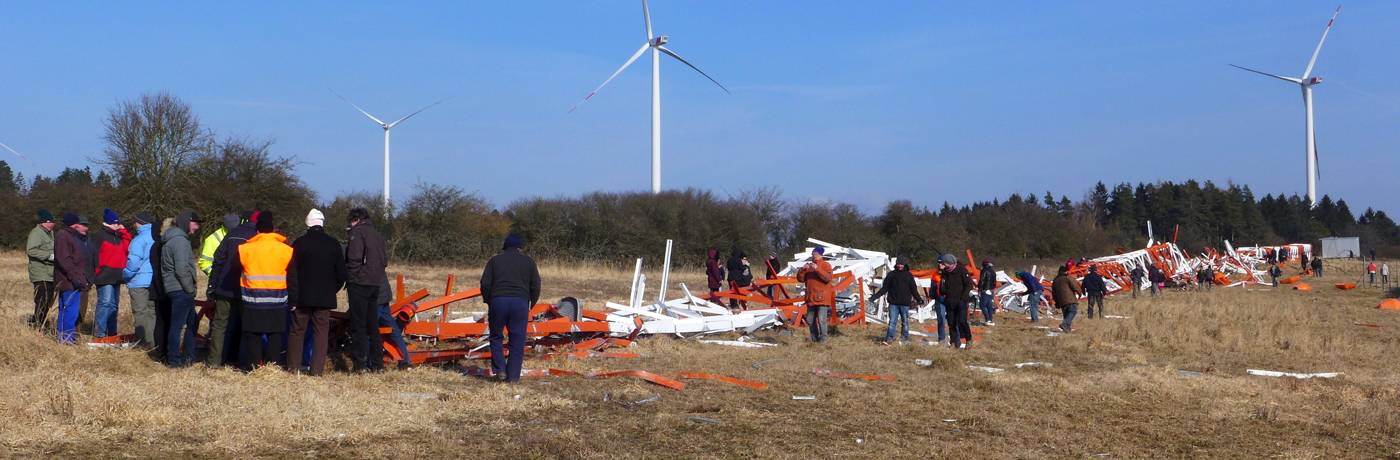 Gesprengter Mast Mittelwelle Thurnau